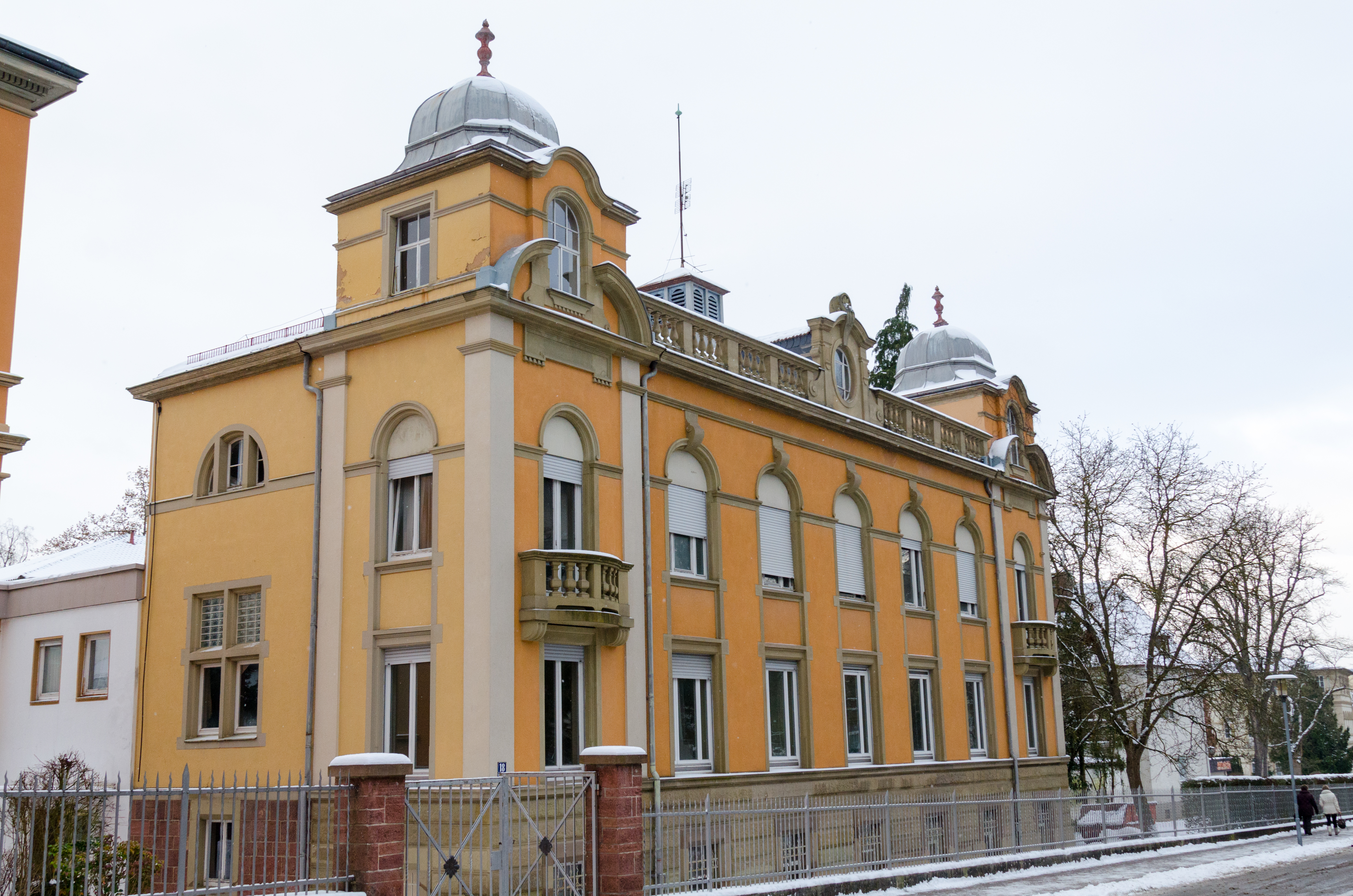 Bad Kissingen, Prinzregentenstraße 13